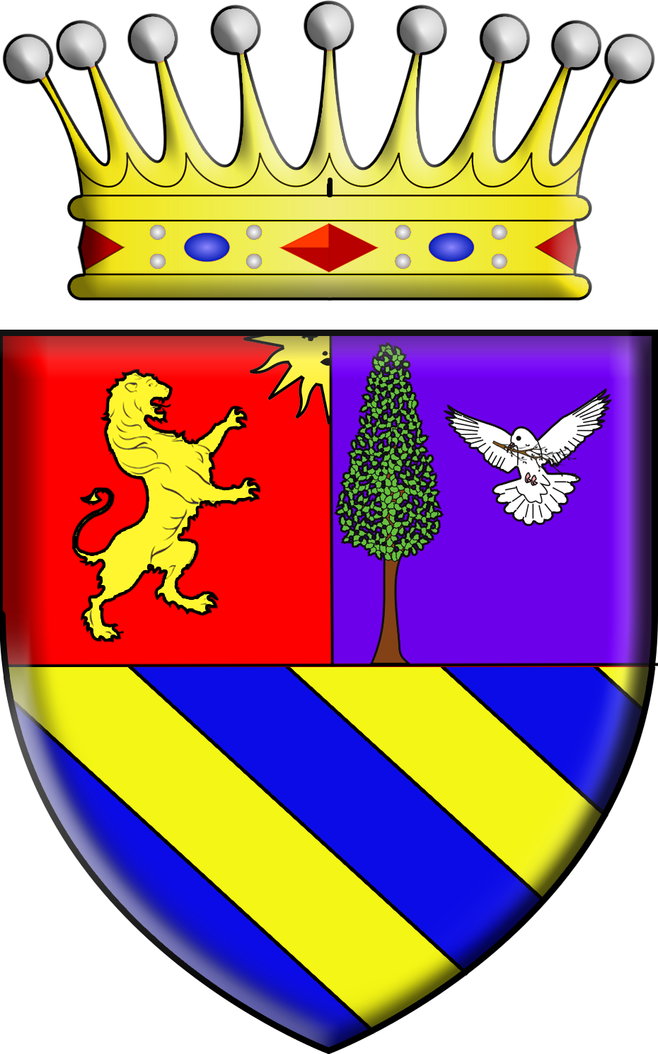 Armoiries de la famille Pratolongo (Italie)